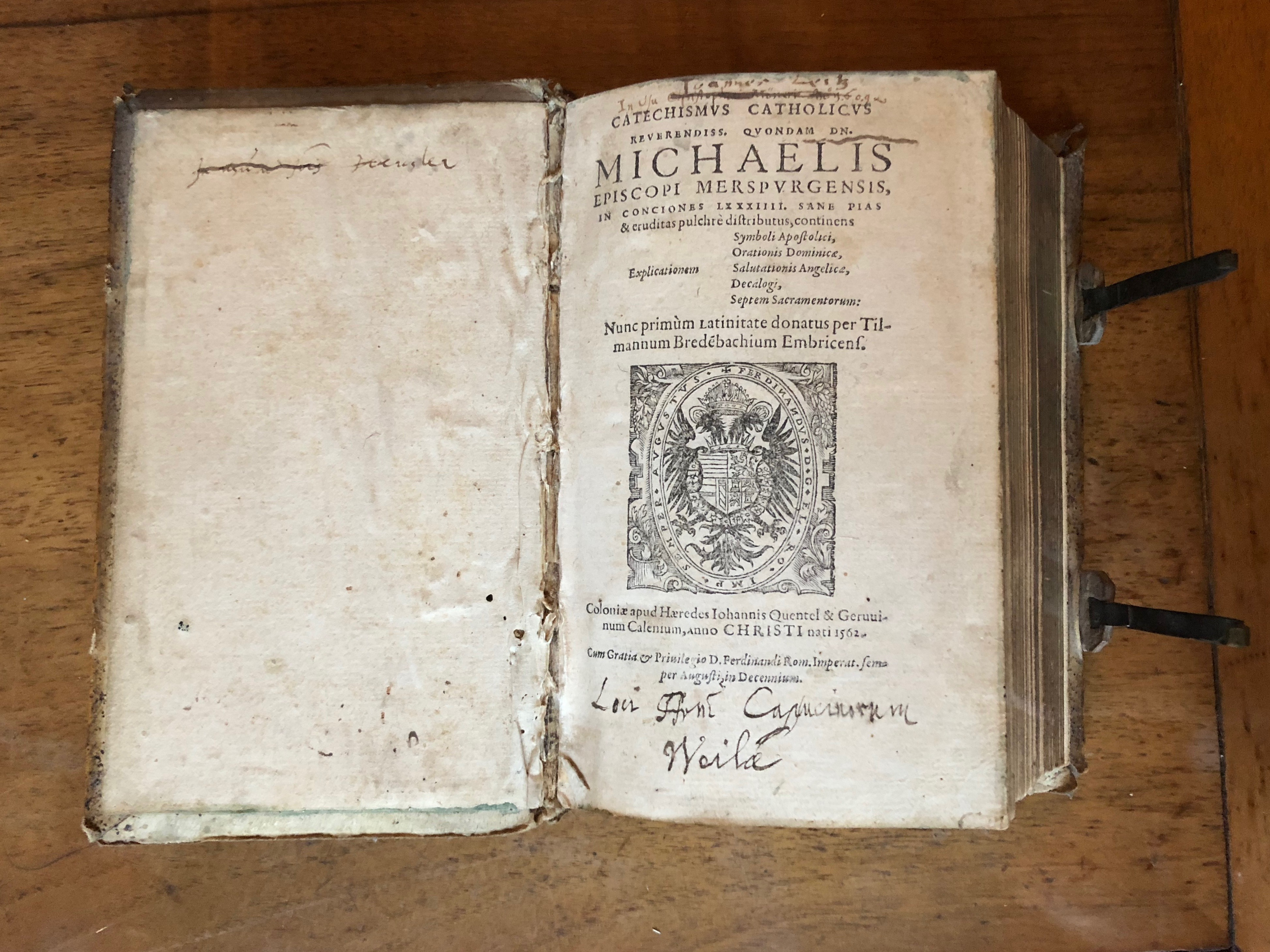 Michael Heldin, Katechismus, 1562